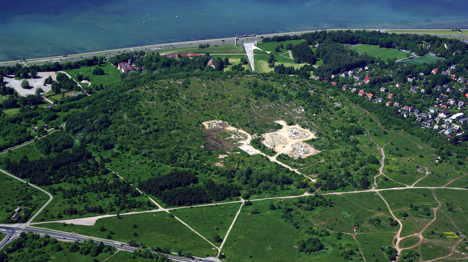 Õhuvaade Paevälja asumi loodeosale